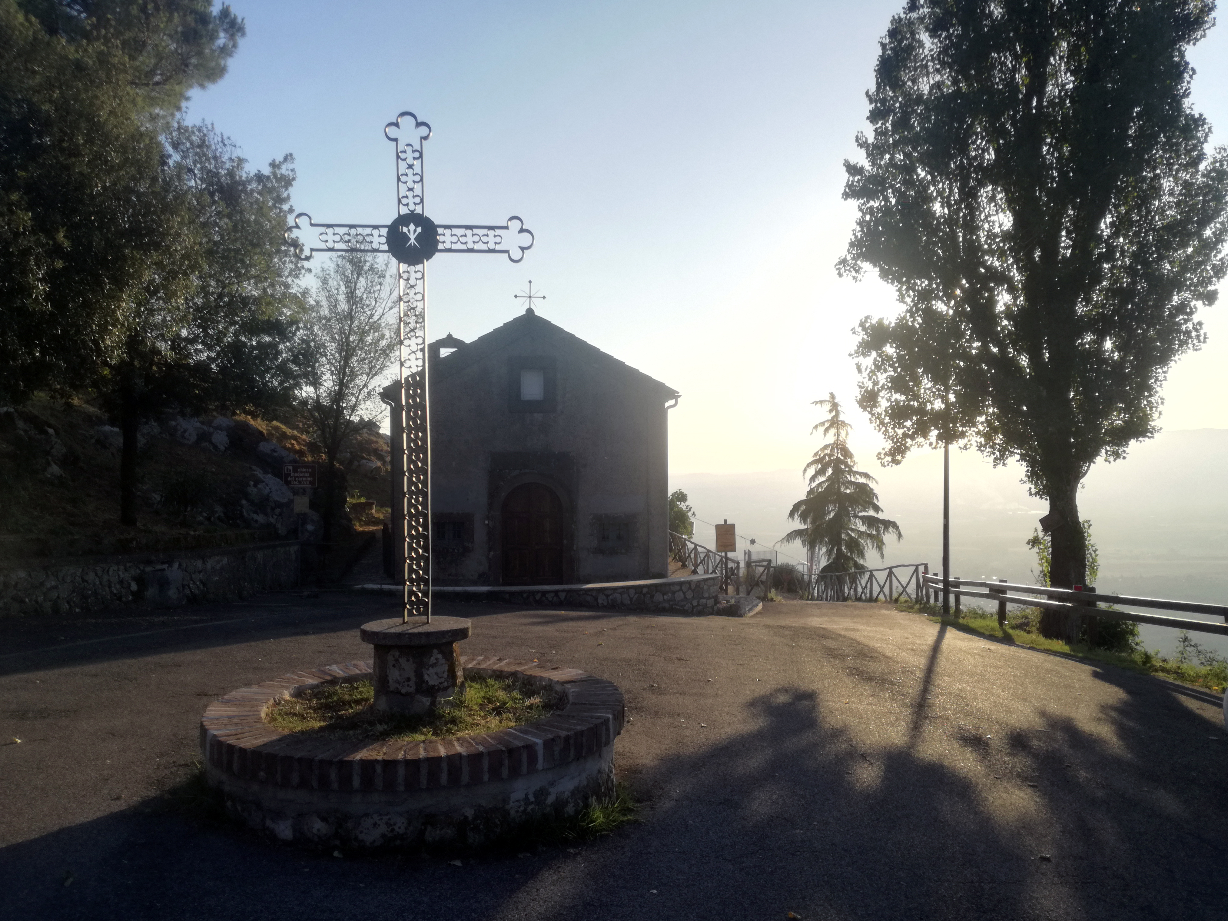 Chiesa della Madonna del Carmine, comune di Rocca Massima